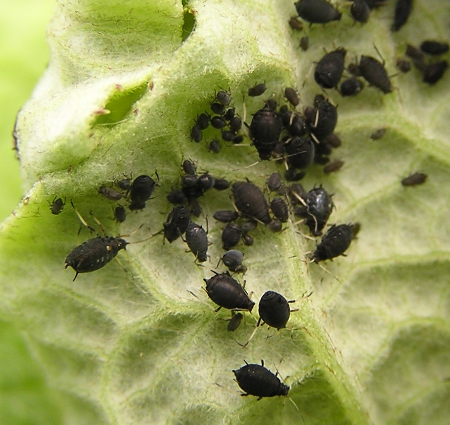 Aphis fabae auf Arctium lappa in der Nähe von Bonn.